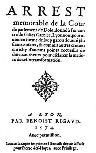 Arrêt de la cour de Dôle à l'encontre d'un loup-garou - France - 1574